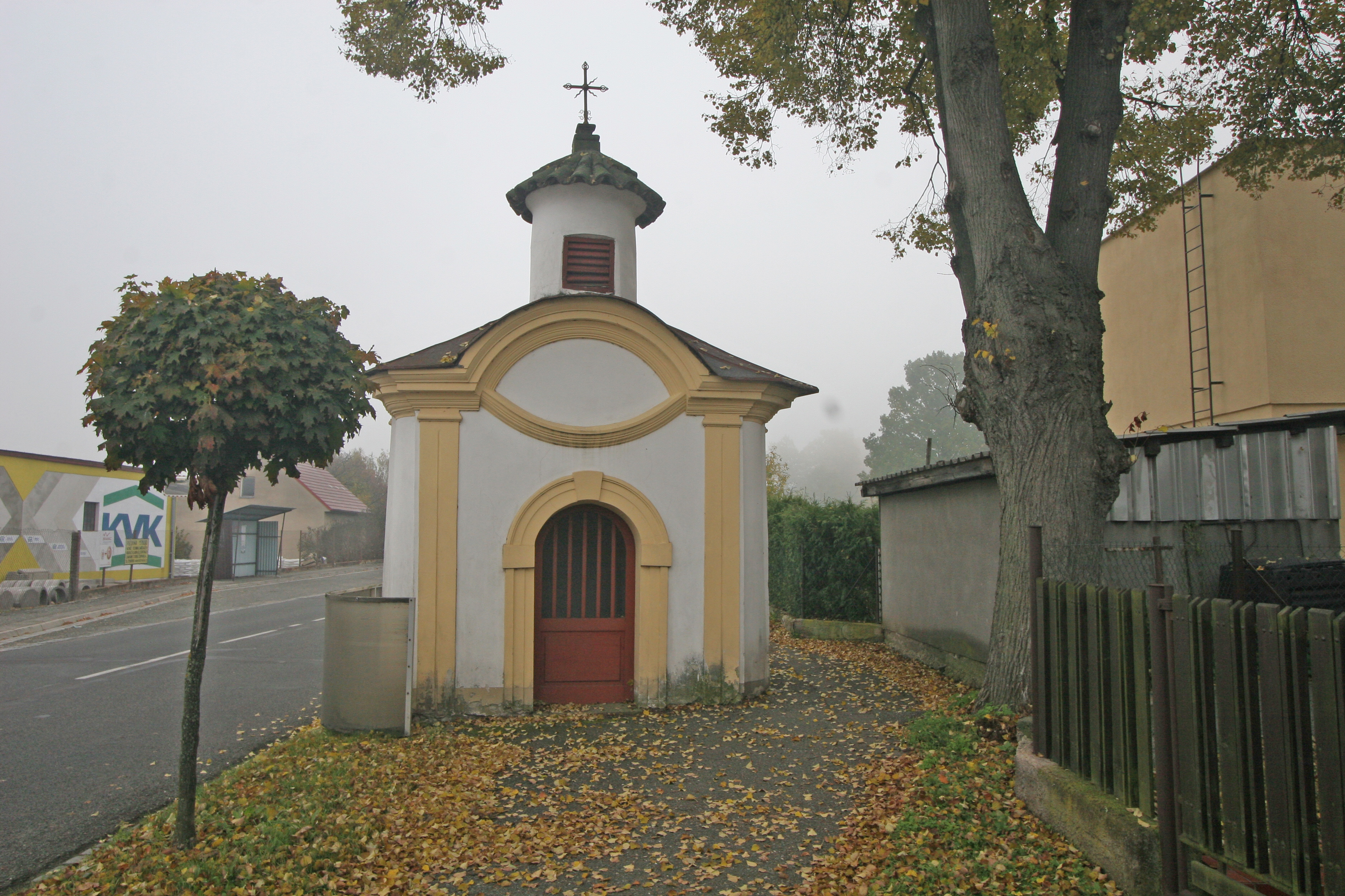 Kaple (Třebechovice pod Orebem), Trčkova ul., při silnici na Bědovice, Třebechovice pod Orebem